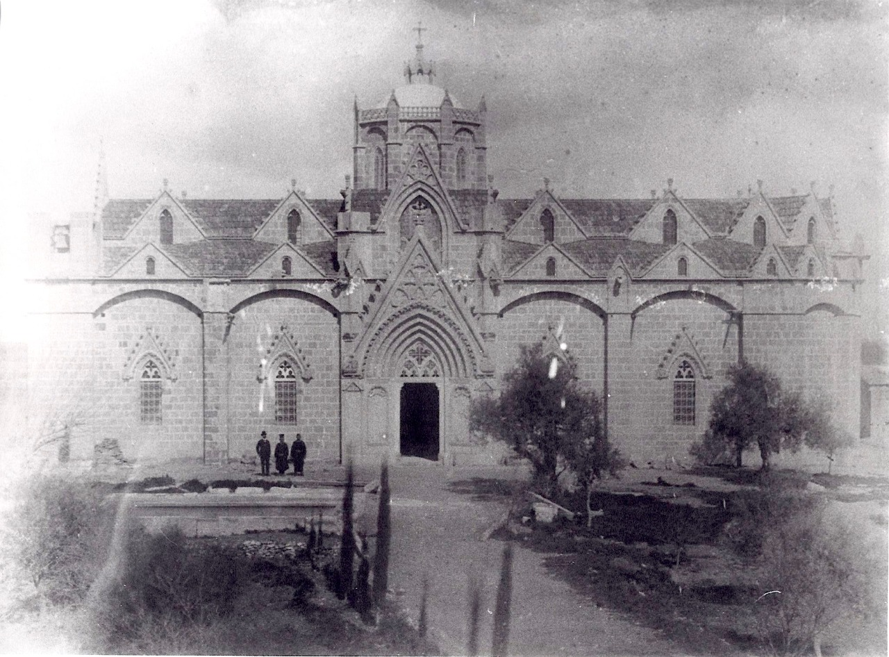 Lusi blackwhite